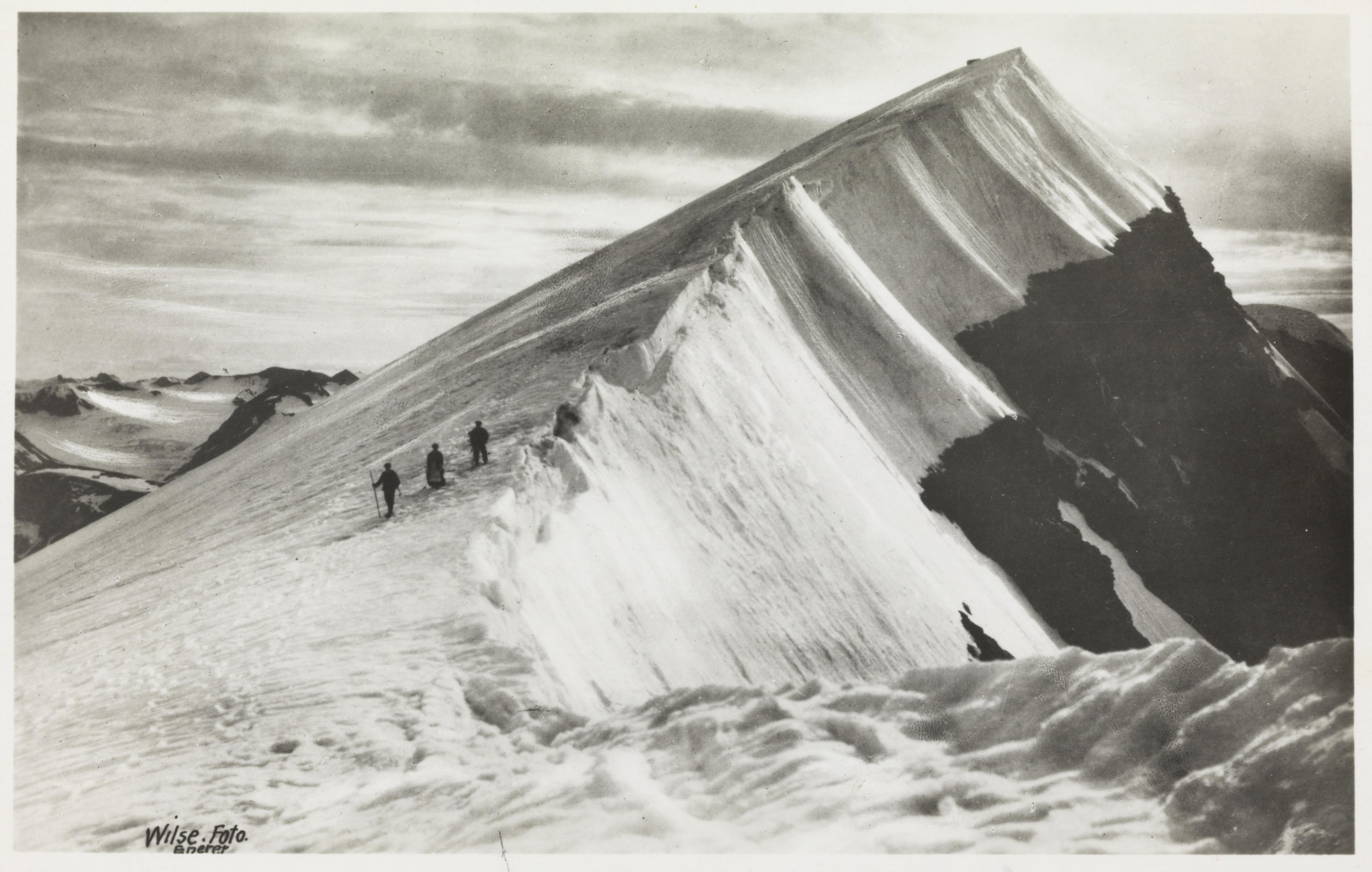 Bildet er hentet fra Nasjonalbibliotekets bildesamling Glittertind, Lom, Oppland